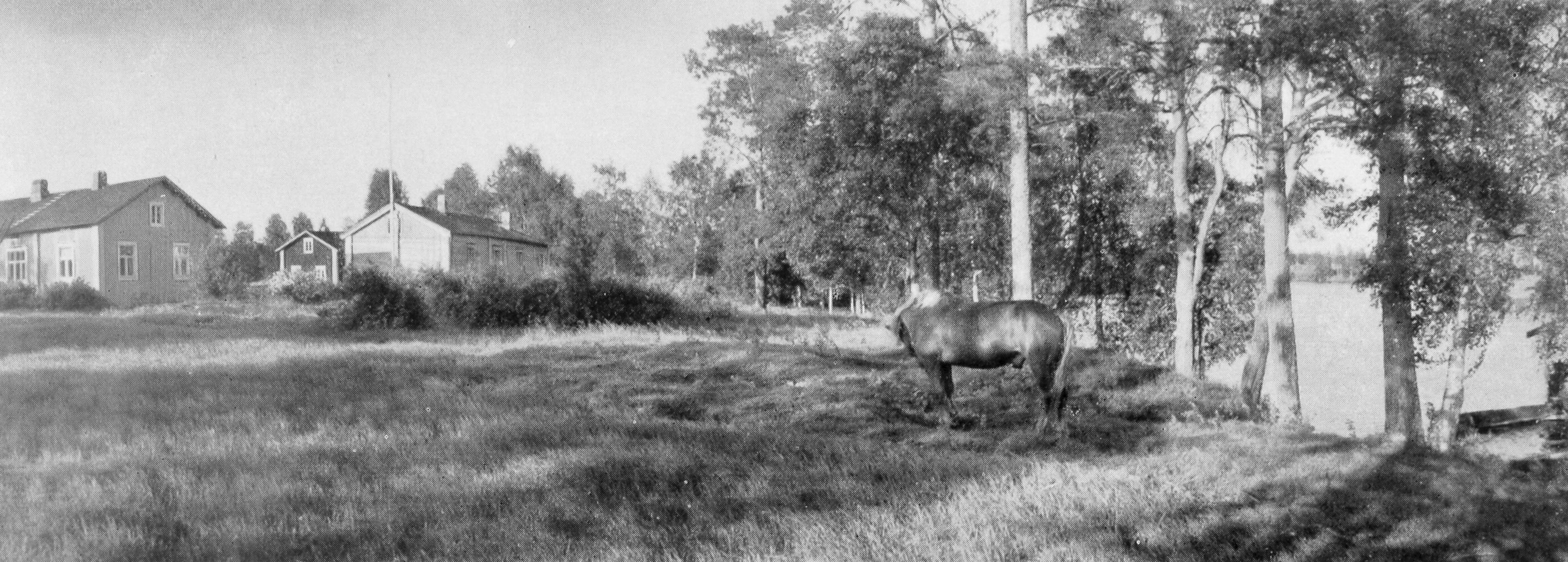 Eino Leinon syntymäkoti Hövelö Paltaniemellä. Vanha päärakennus oikealla. Kuvan on ottanut Erkki Mäkinen 1930-luvulla. Kuva julkaisusta Kainuu kuvissa (Kajaani 1938).